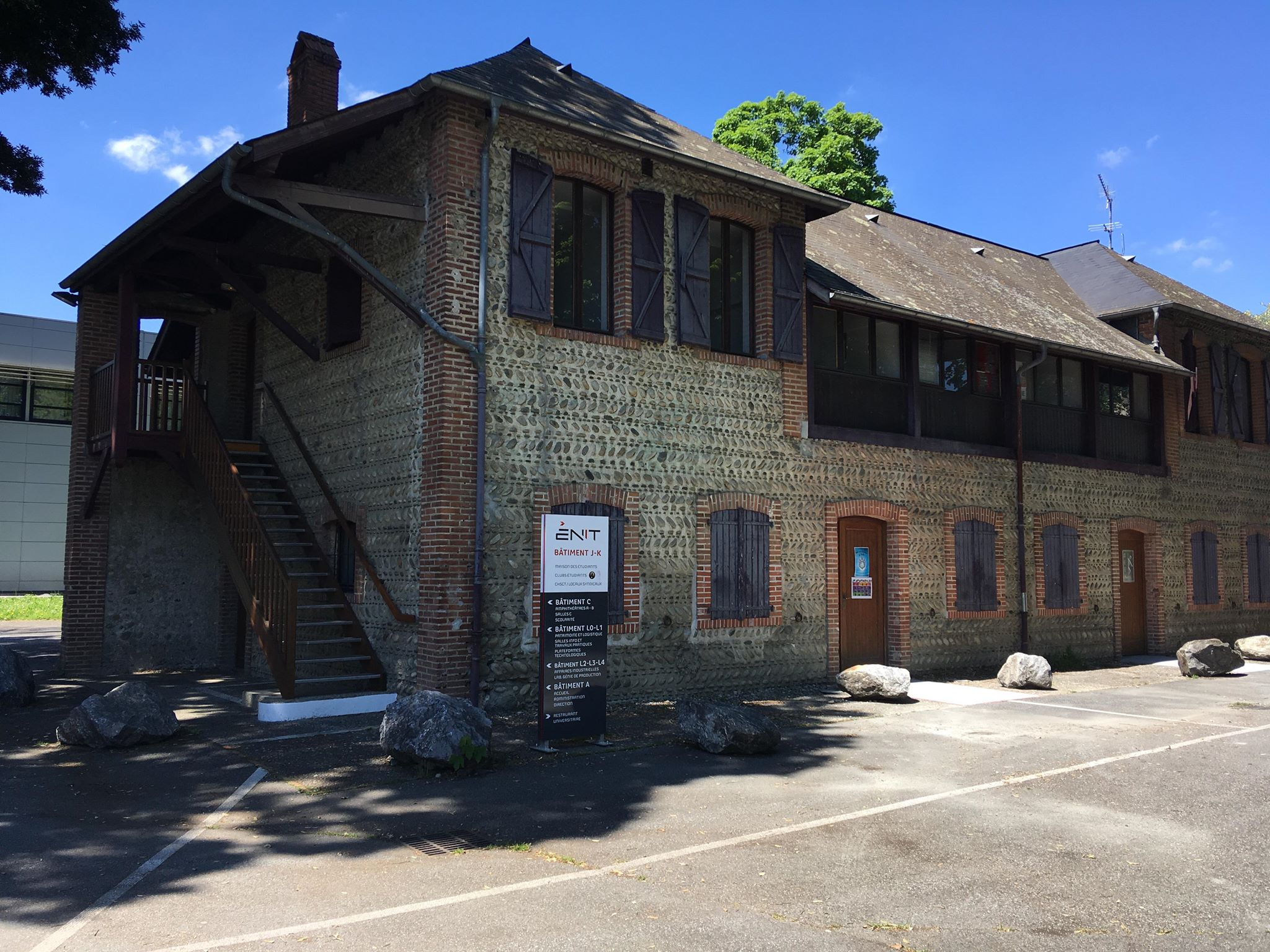 Façade de la maison des élèves de l'ENIT.